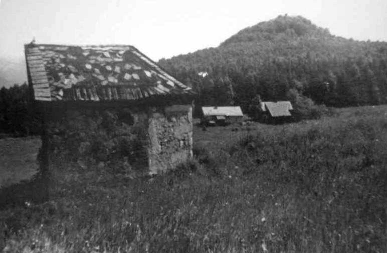 Dobový snímek kaple sv. Antonína Paduánského na Vlčí Hoře